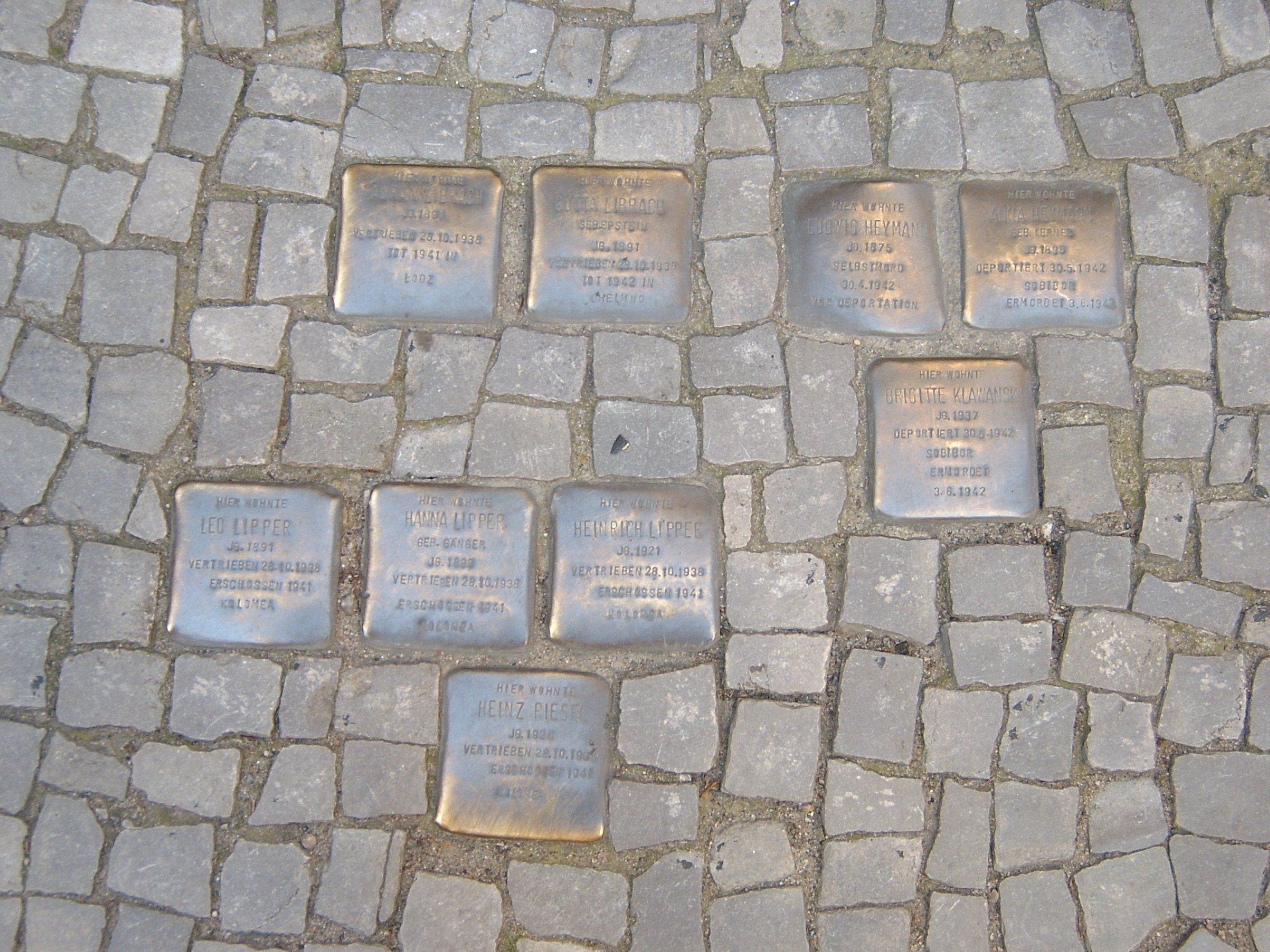 Stolpersteine vor der Großen Märkerstraße 13 in Halle (Saale).